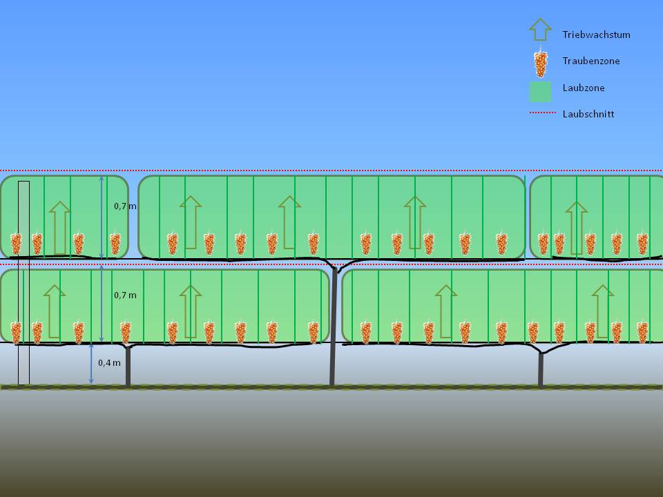 Te Rauwhata Two Tier TK2T